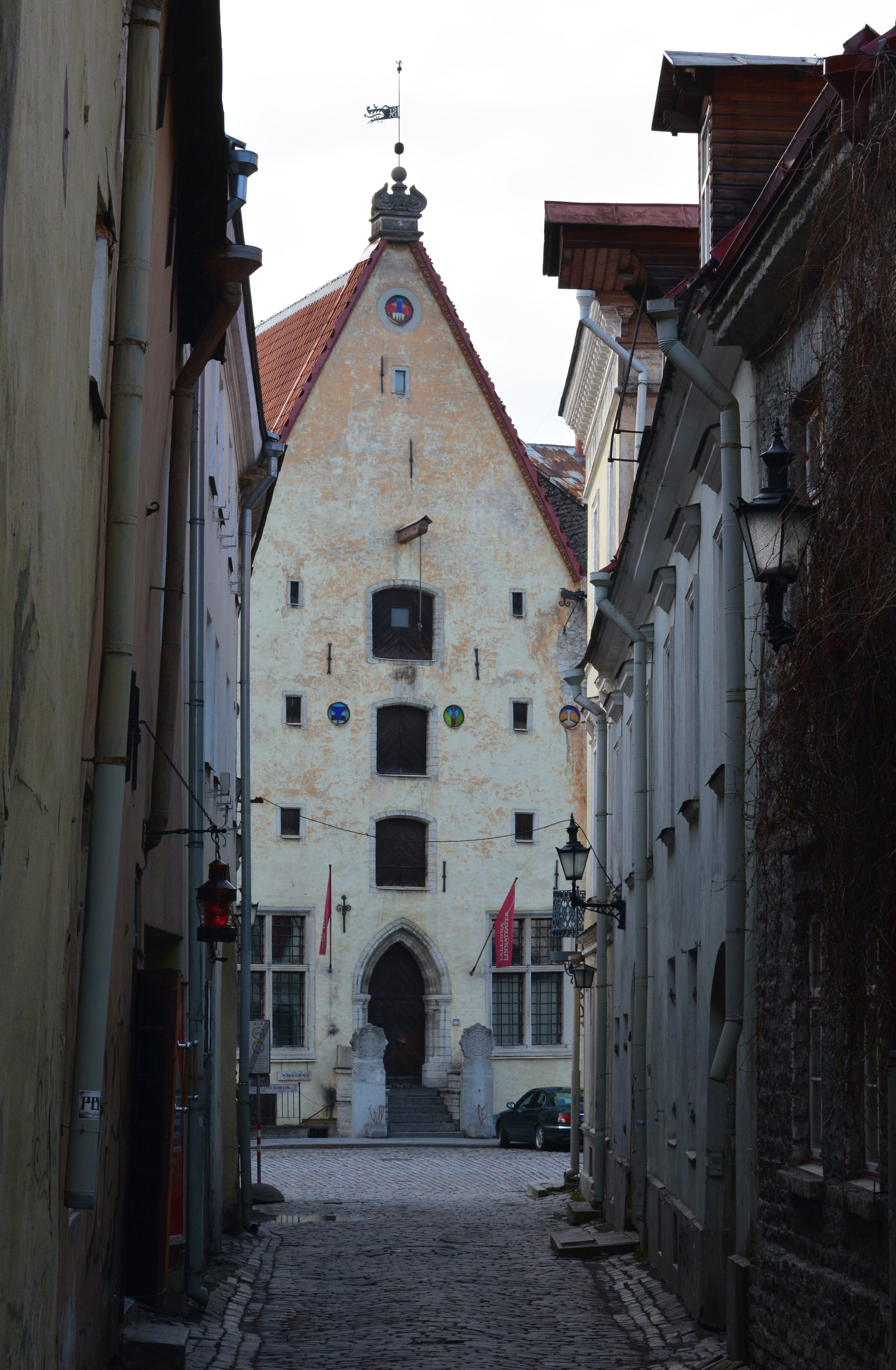 Vaade Vaimu tänavalt